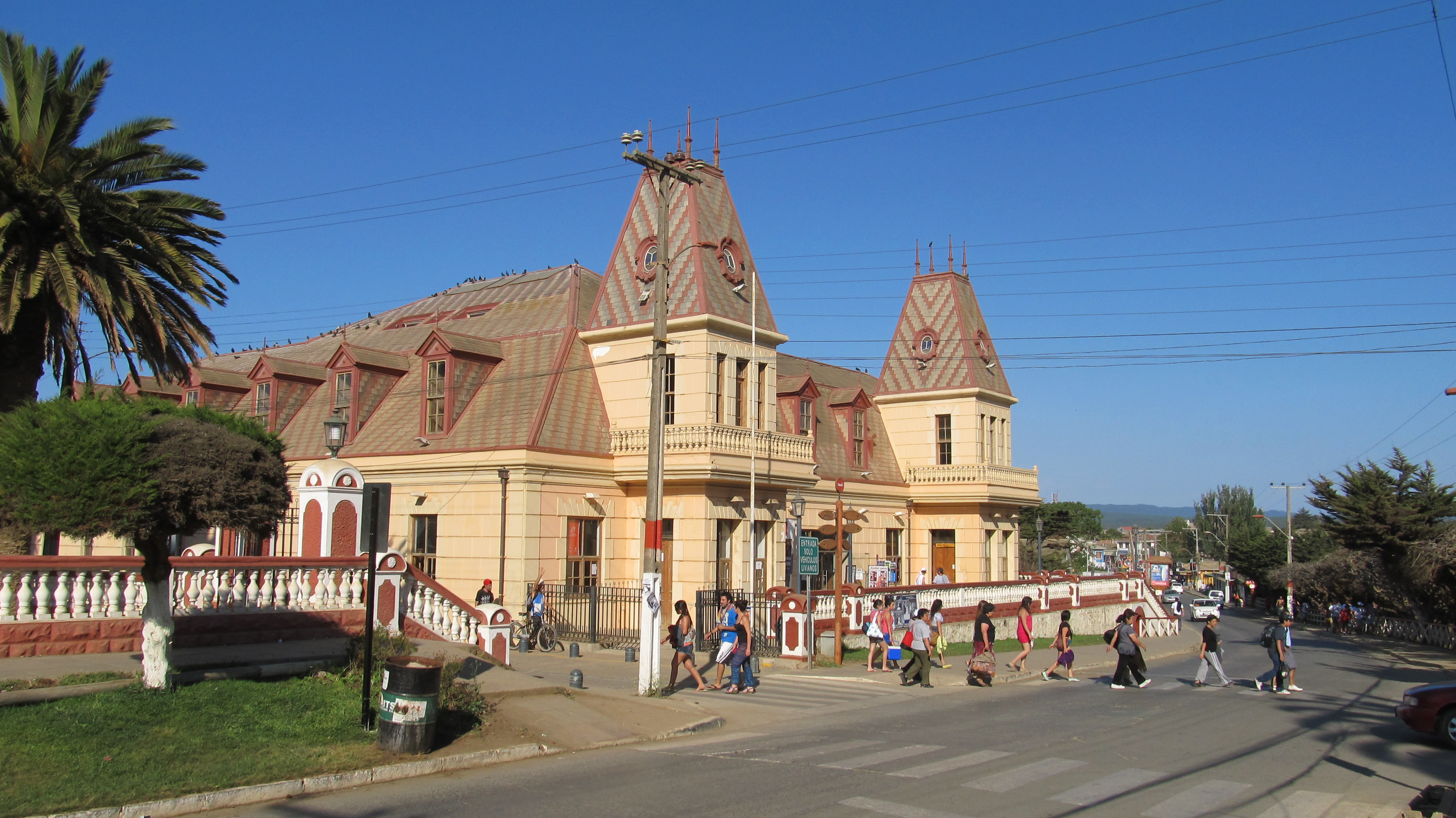 Antiguo casino de Pichilemu This is a photo of a national monument in Chile: 1173